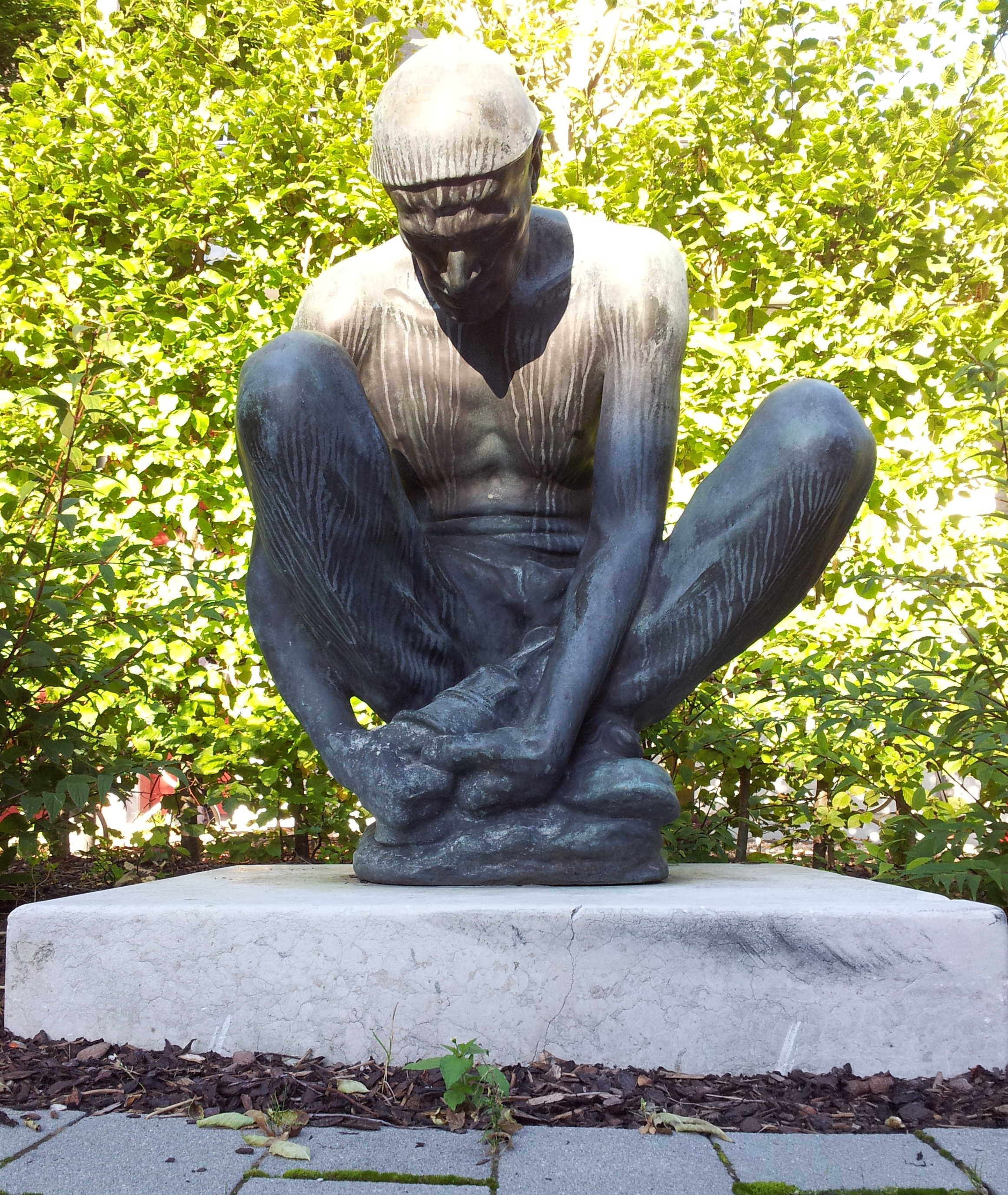 Fritz Koelle (1895-1953) - Hockender Bergmann im Garten des Münchner Gewerkschaftshauses